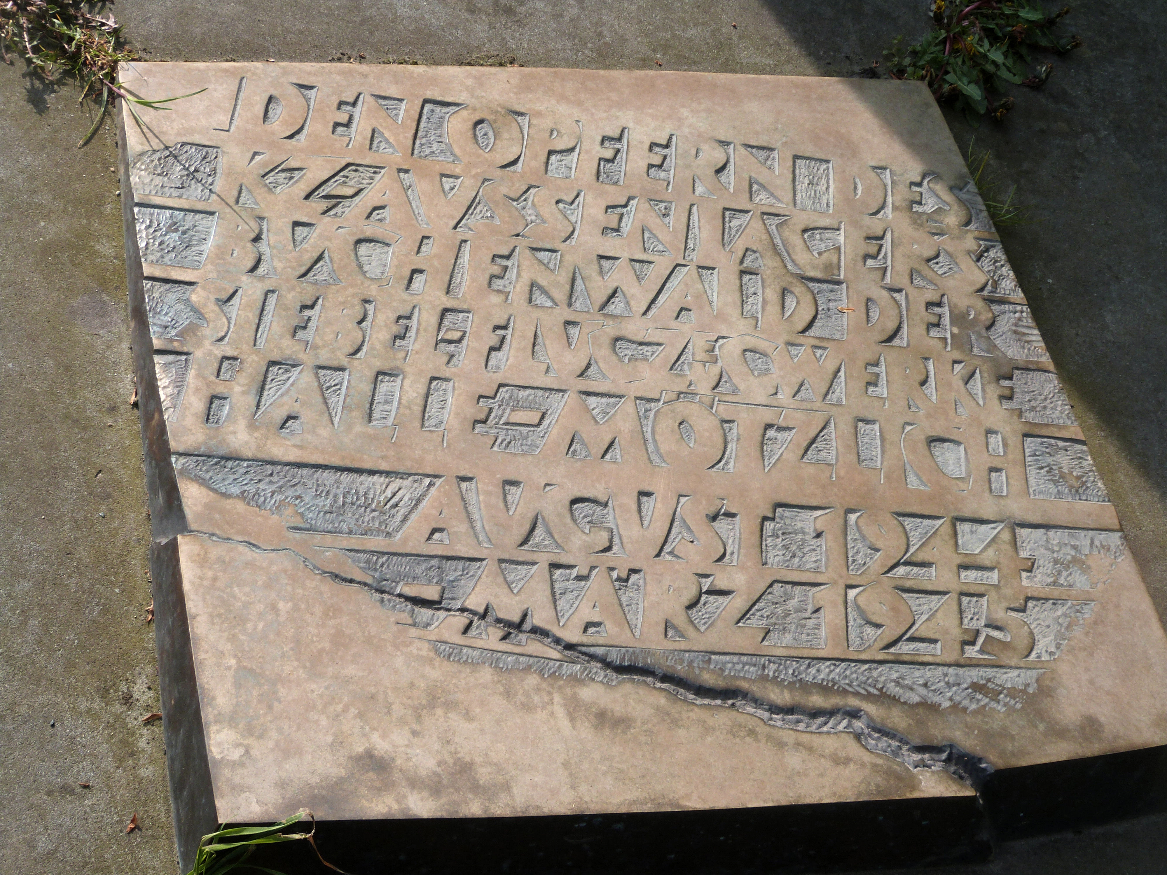 Inschrifttafel am Denkmal für die Opfer des KZ-Außenlagers Birkhahn der Siebel Flugzeugwerke Halle-Mötzlich, Dessauer Straße, Bildhauer: Bernd Kleffel, 2009